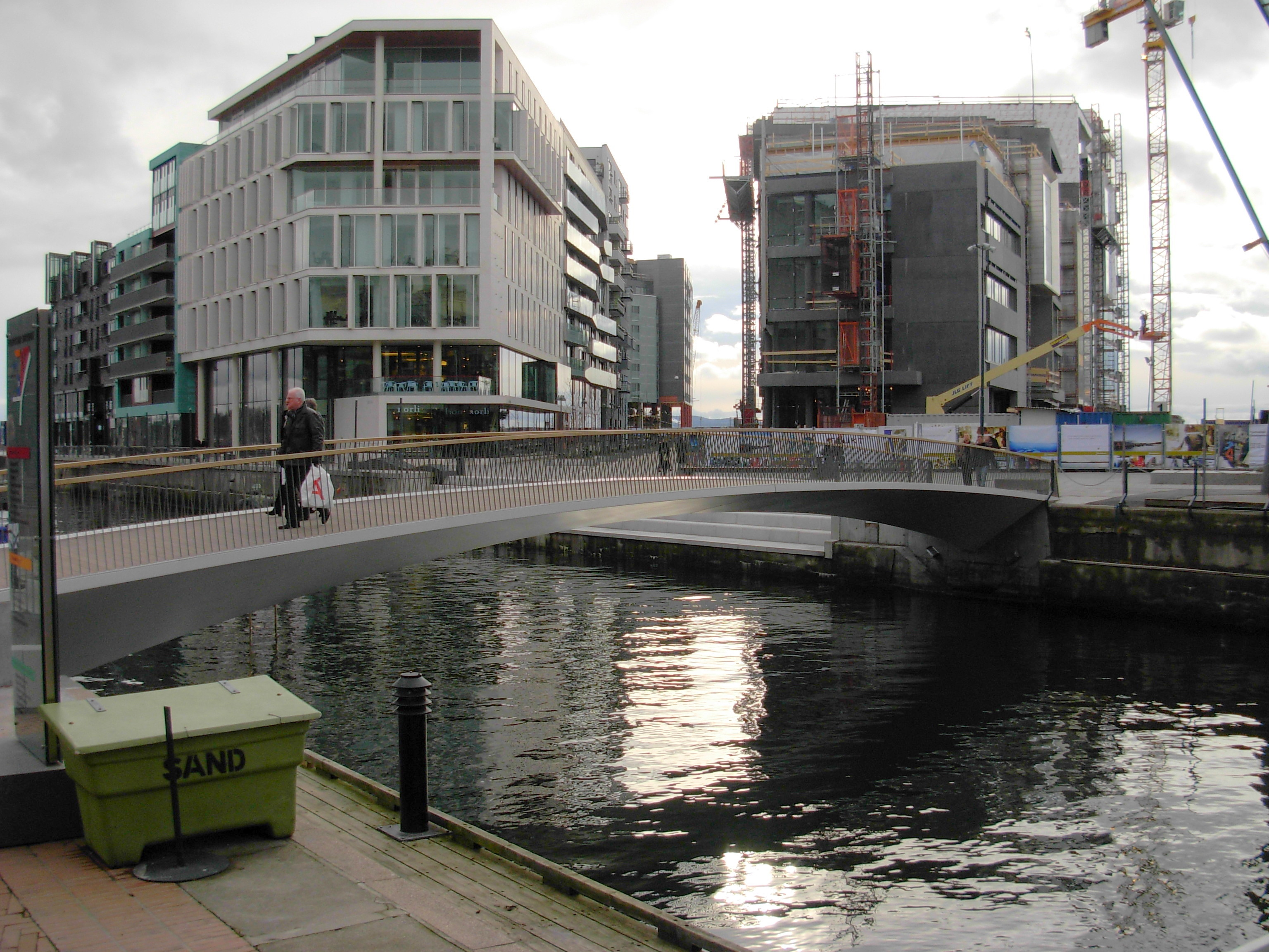 Tjuvholmen, seen from Aker brygge, March 2008